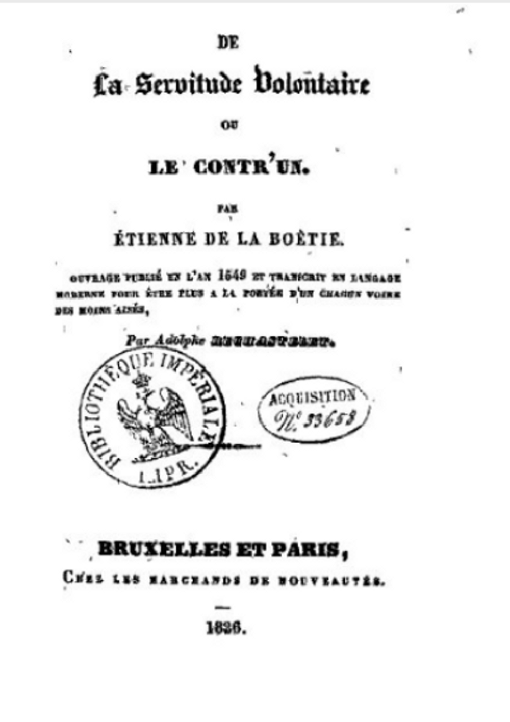 De la servitude volontaire, ou Le contr'un - par Étienne de La Boétie : ouvrage publié en l'an 1549 et transcrit en langage moderne par Adolphe Rechastelet.